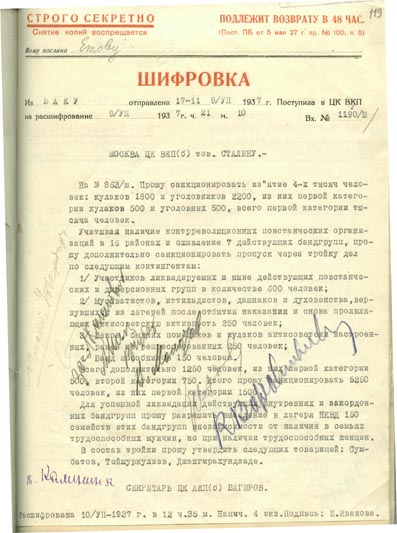 Шифротелеграмма из Баку - И.В. Сталину